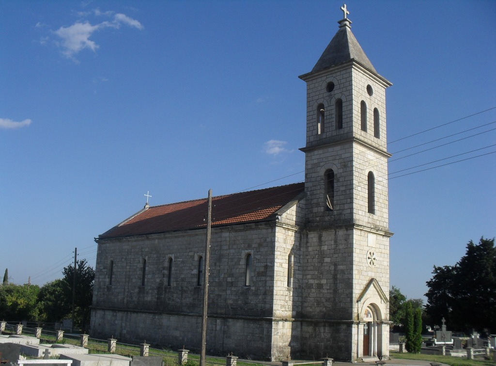 Храм СПЦ Рођења Св. Јована Крститеља у Ивошевцима, Далмација